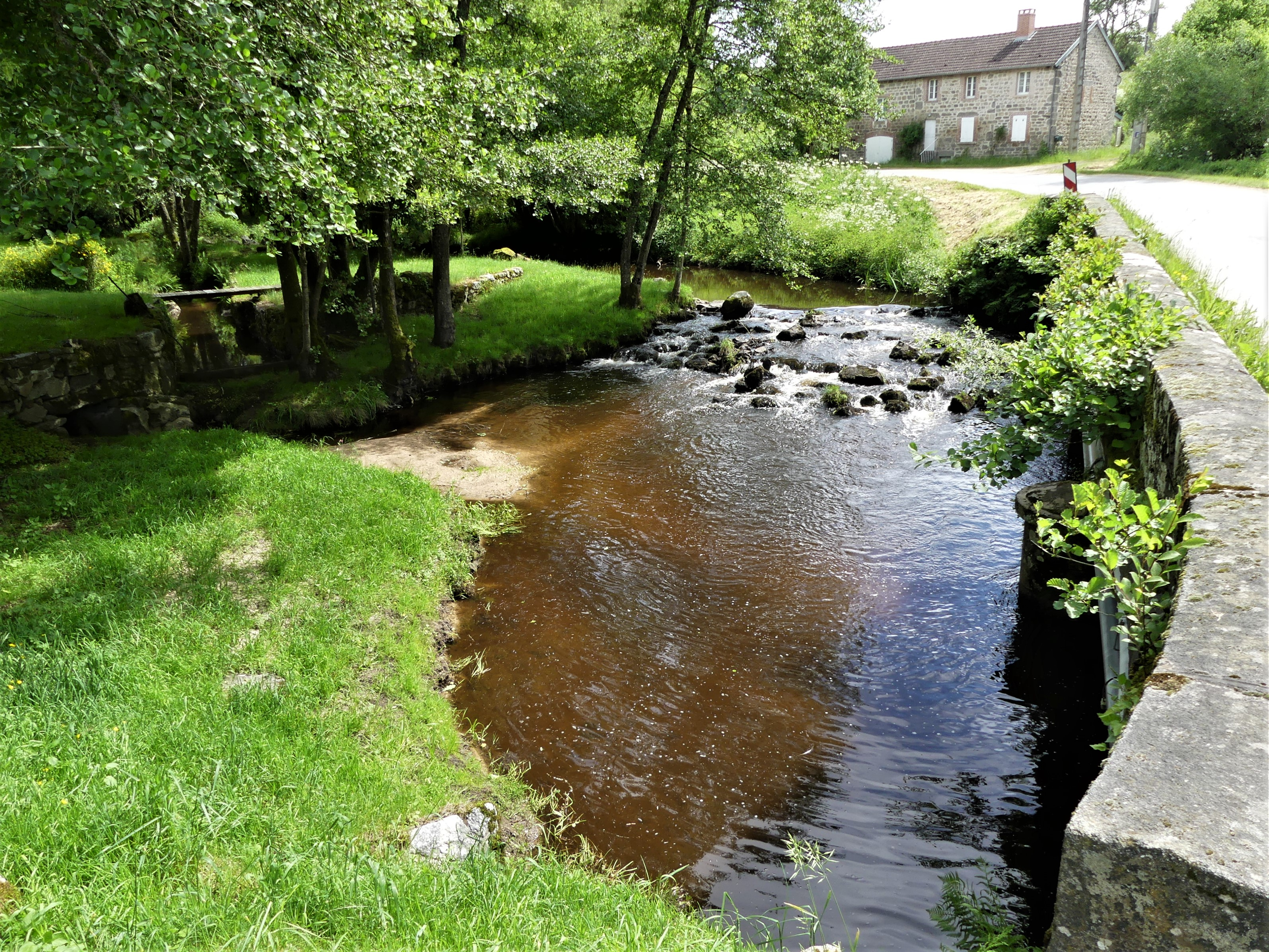 La Banize en amont du pont de la route départementale 16, Vallière, Creuse, France.